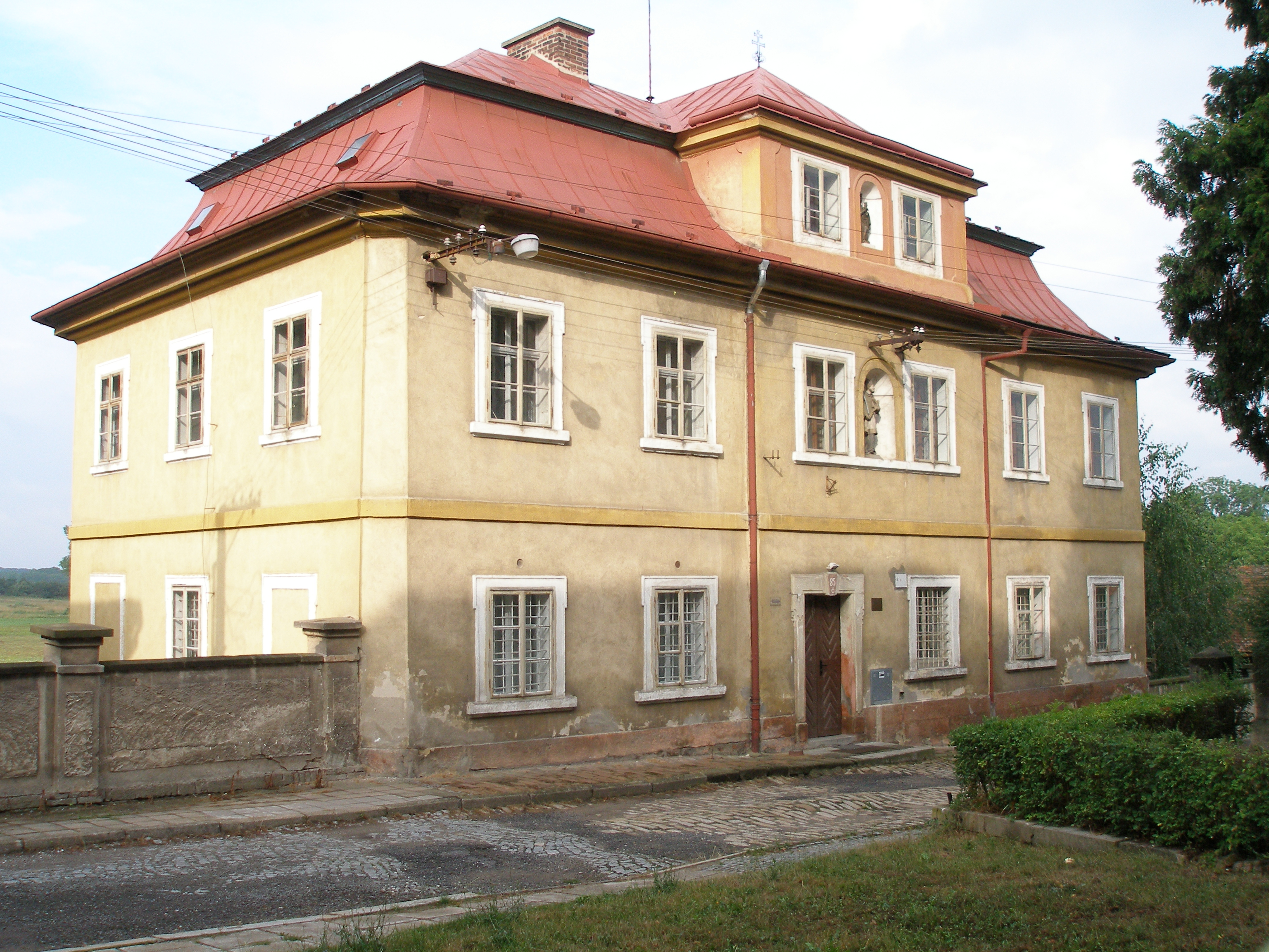 Fara v Kopidlně